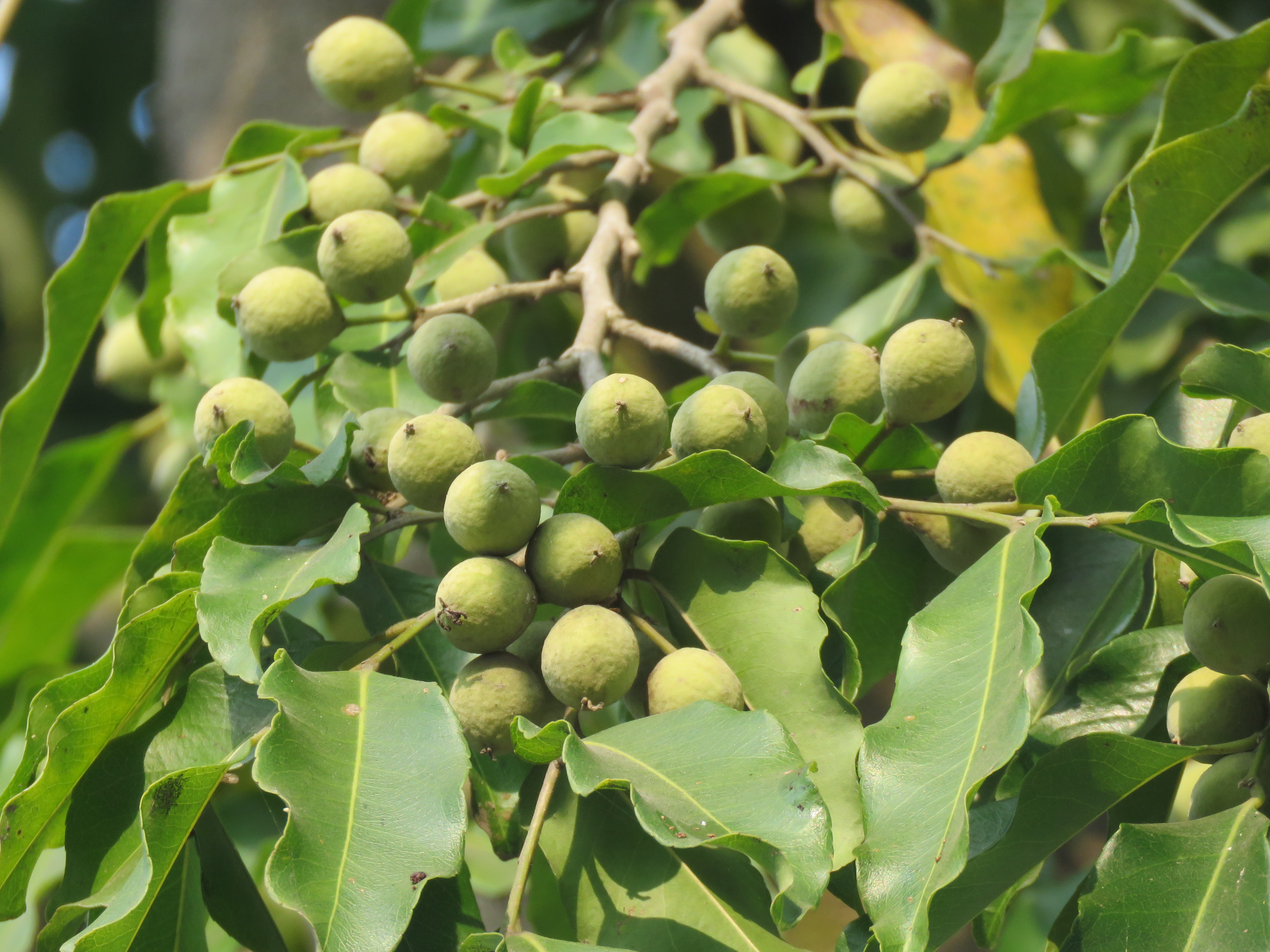 Photos during IRCTC 2017 - by Vinayaraj